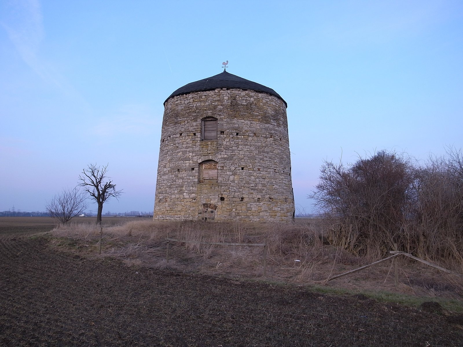 Schafstädt, Windmühle, Koordinaten: N51 23.384 E11 46.279